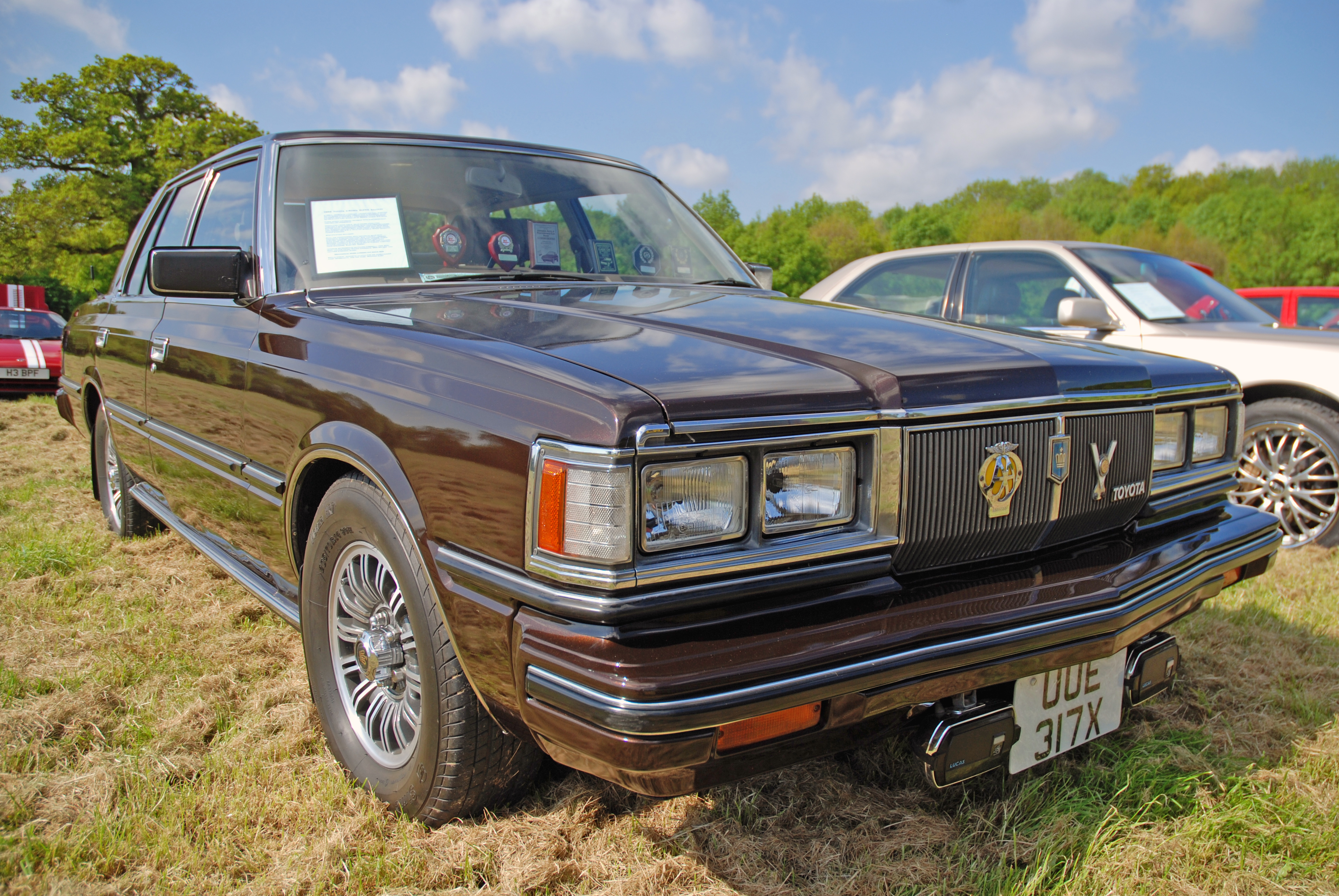 May 2013